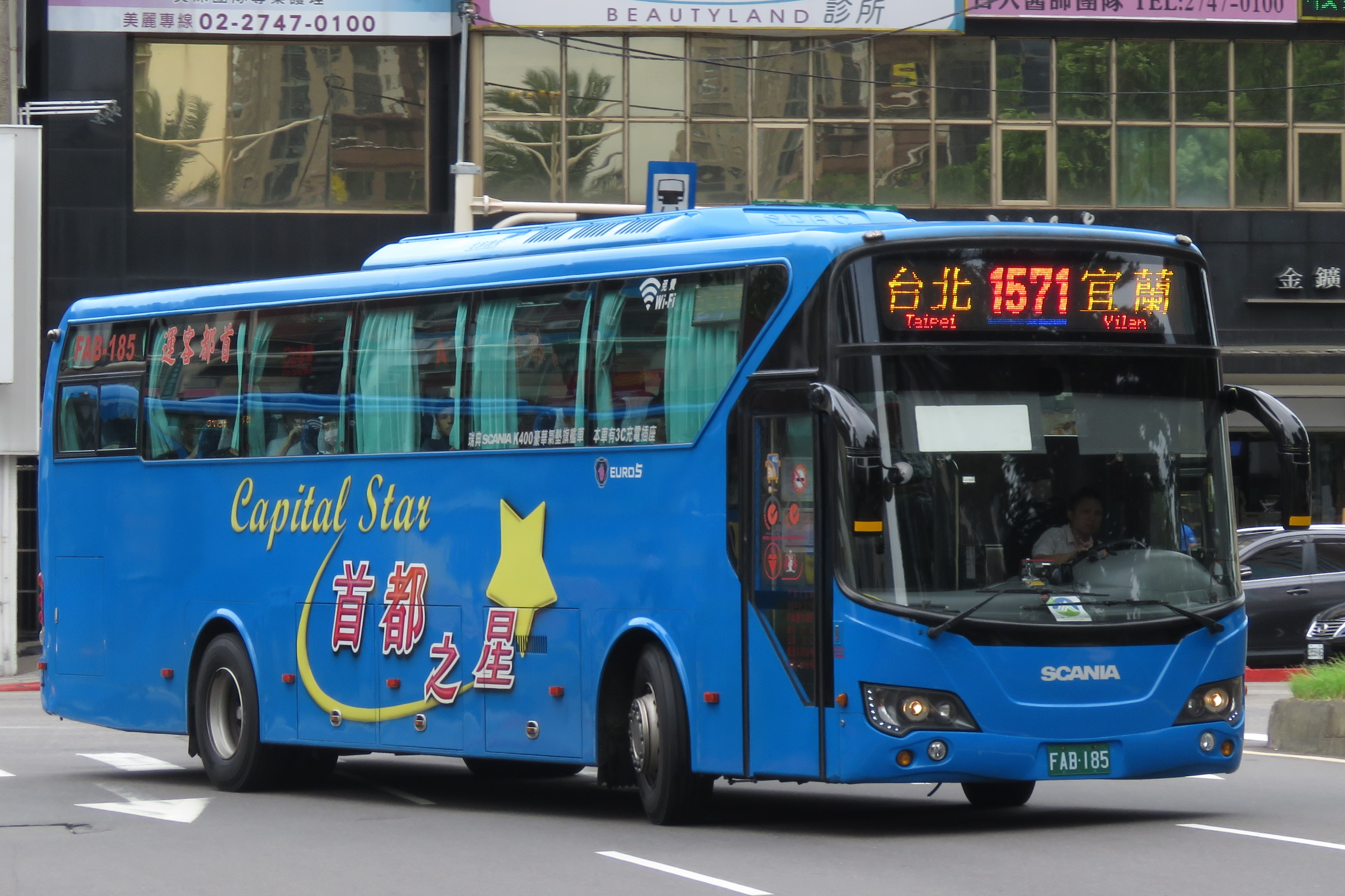 首都客運 2015 SCANIA K400IB4X2NB FAB-185 1571路 臺北→宜蘭